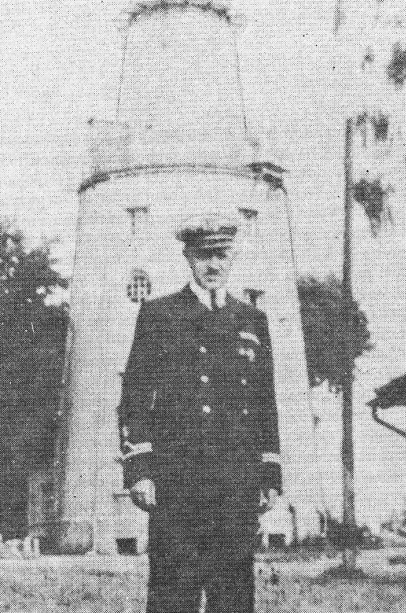 Leon Wzorek przy latarni morskiej w Rozewiu.